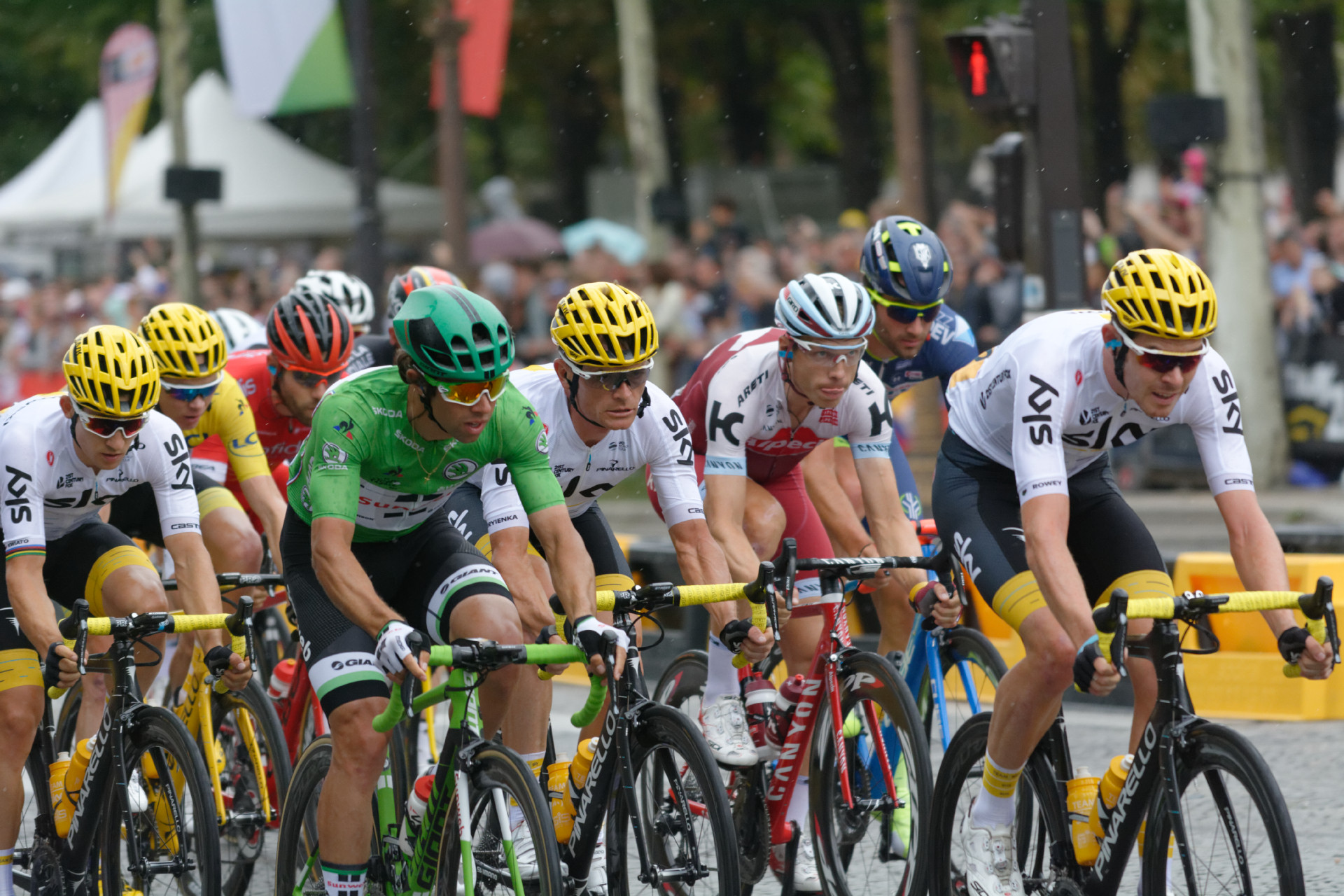 D71_8628_DxO